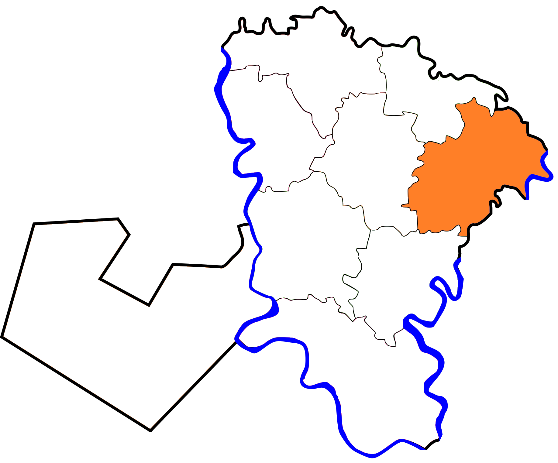 خريطة مركز قويسنا بالنسبة لمحافظة المنوفية، مصر.